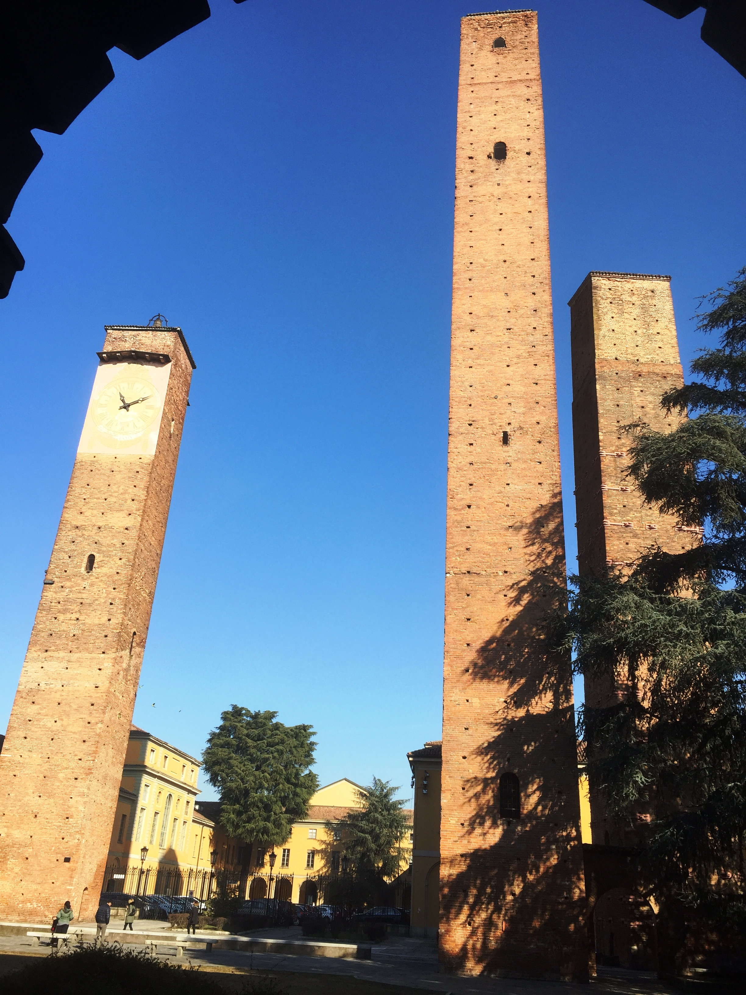 Le torri di Pavia